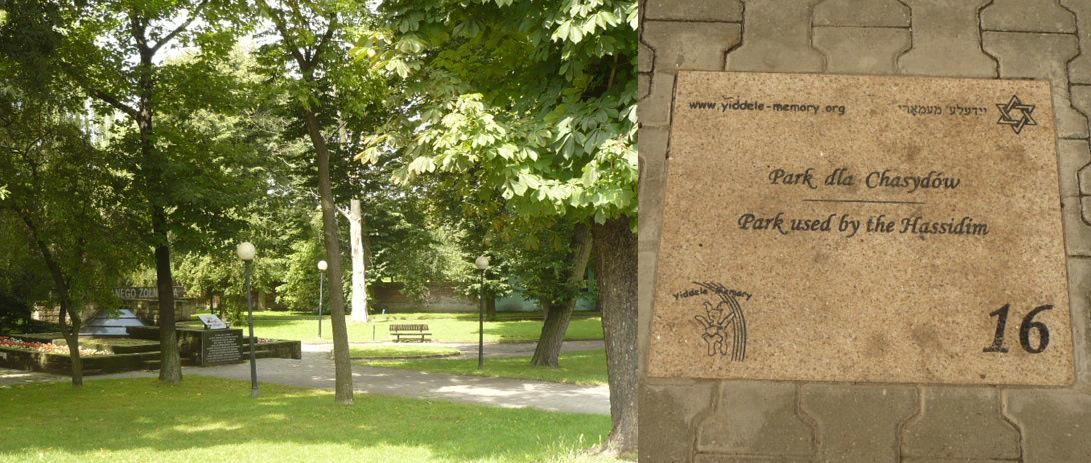 Radomsko. Otwarte Muzeum Żydowskie 16